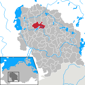 Demen in Mecklenburg-Vorpommern - District Parchim